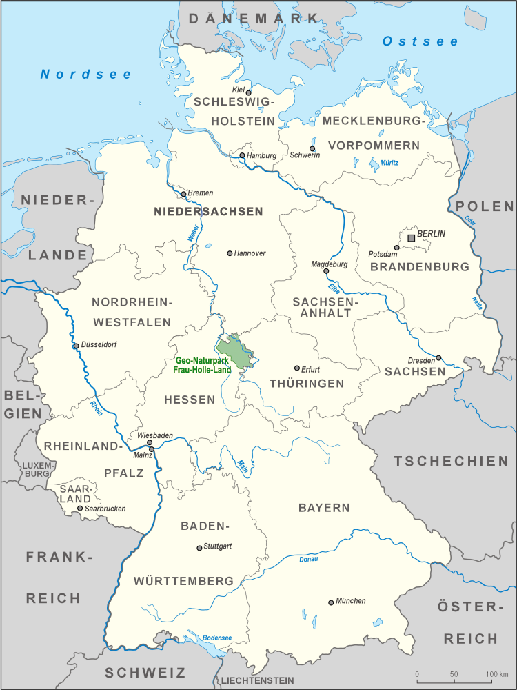 Karte des Geo-Naturparks Frau-Holle-Land (ehemals Naturpark Meißner-Kaufunger Wald) in Deutschland